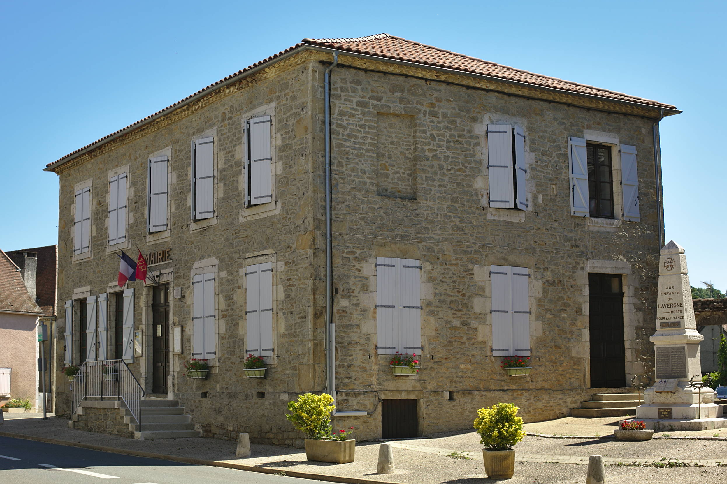 Mairie de Lavergne.